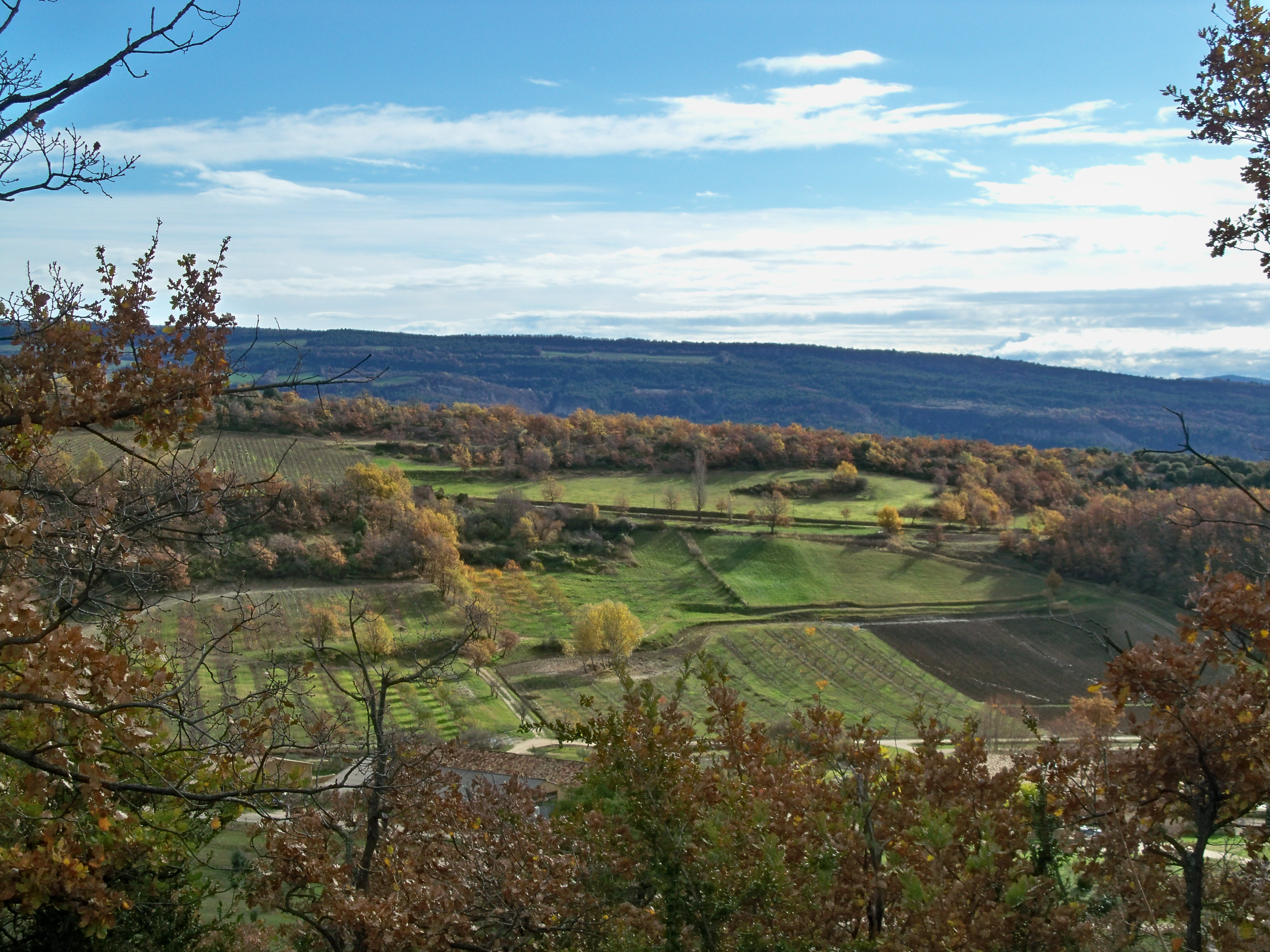 Paysage vue de Simiane la Rotonde (04)